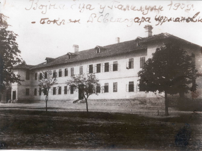 Српски (ћирилица): Касарна на Палилули у Београду (Кнежевина Сrбија) у чијем је једном крилу била смештена Војна болница (фотографија снимљена 1909. године)